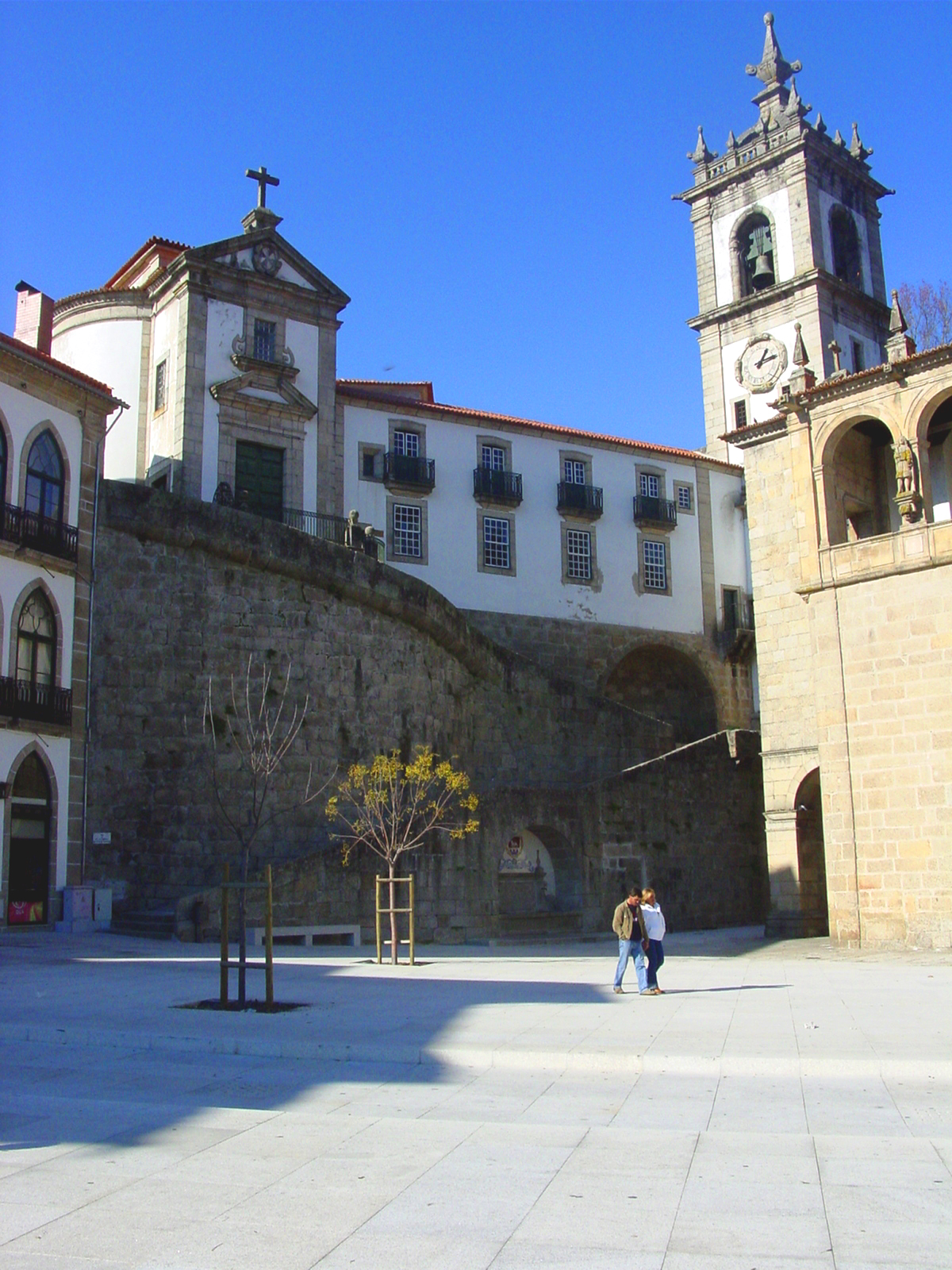 edifícios em Amarante